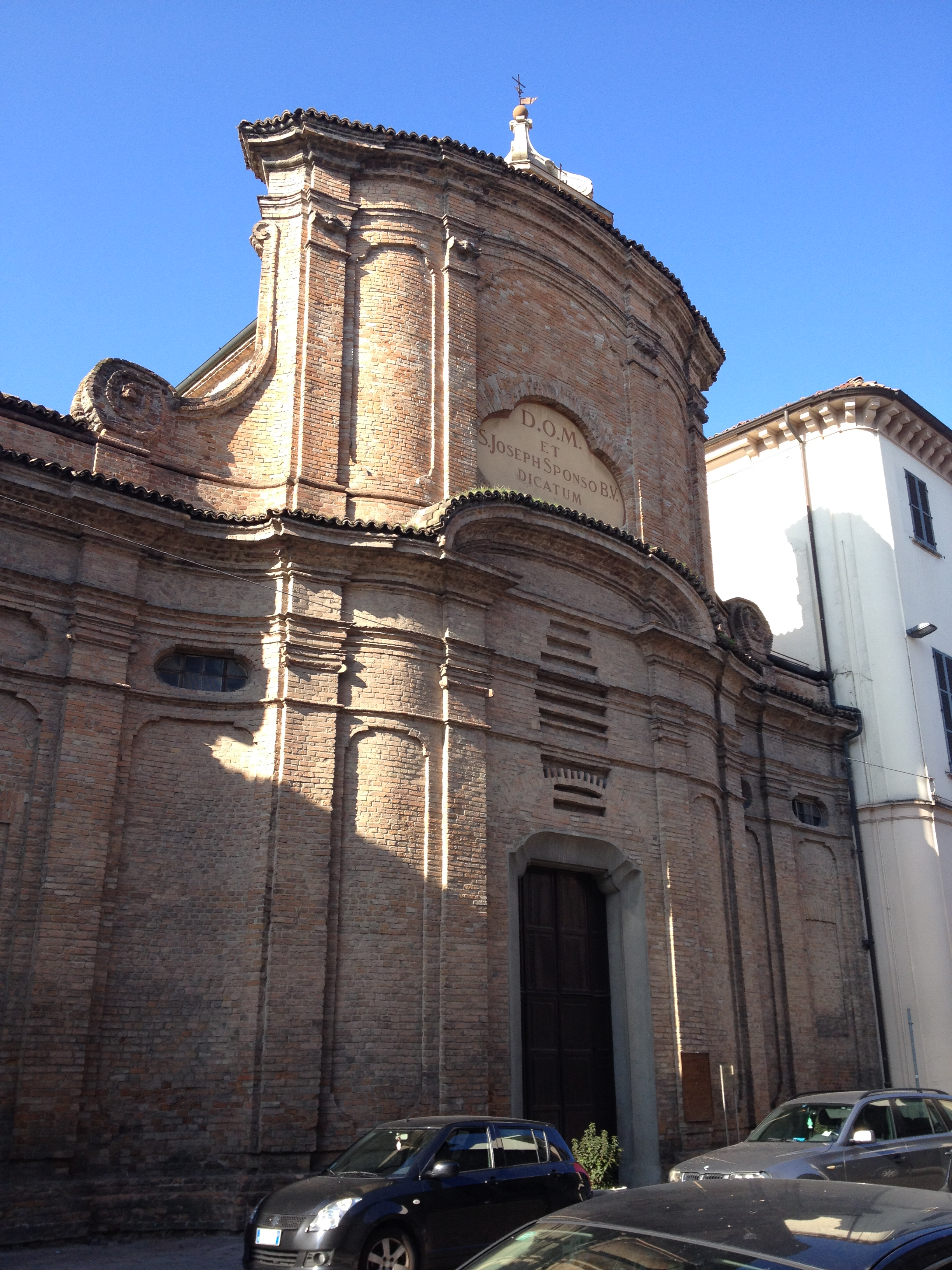 Veduta della chiesa di San Giuseppe di Voghera (PV)